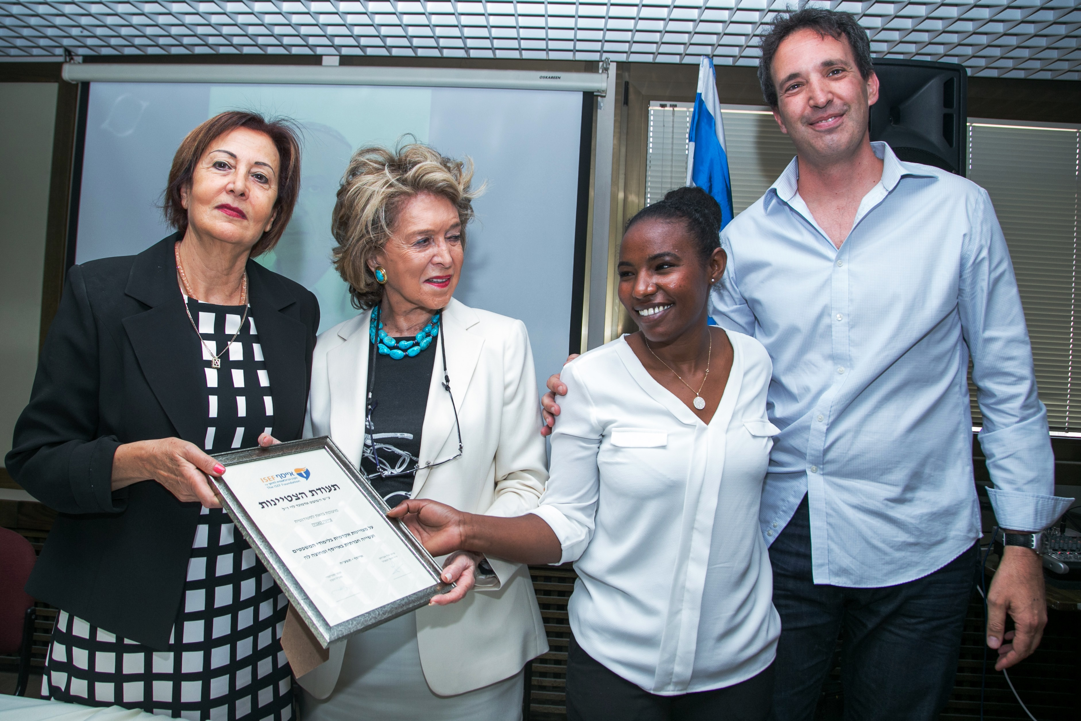 הענקת מלגות הצטיינות על שם שופט בית המשפט העליון אדמונד לוי ז' צילום - עופר עמרם